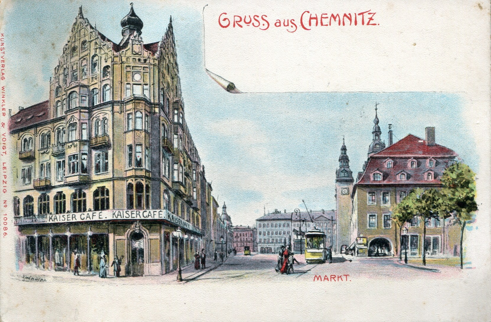 Titel: Gruss aus CHEMNITZ, MARKT; Kartennummer: 10086; Signatur: Erw.Spindler; Signaturlage: links unten